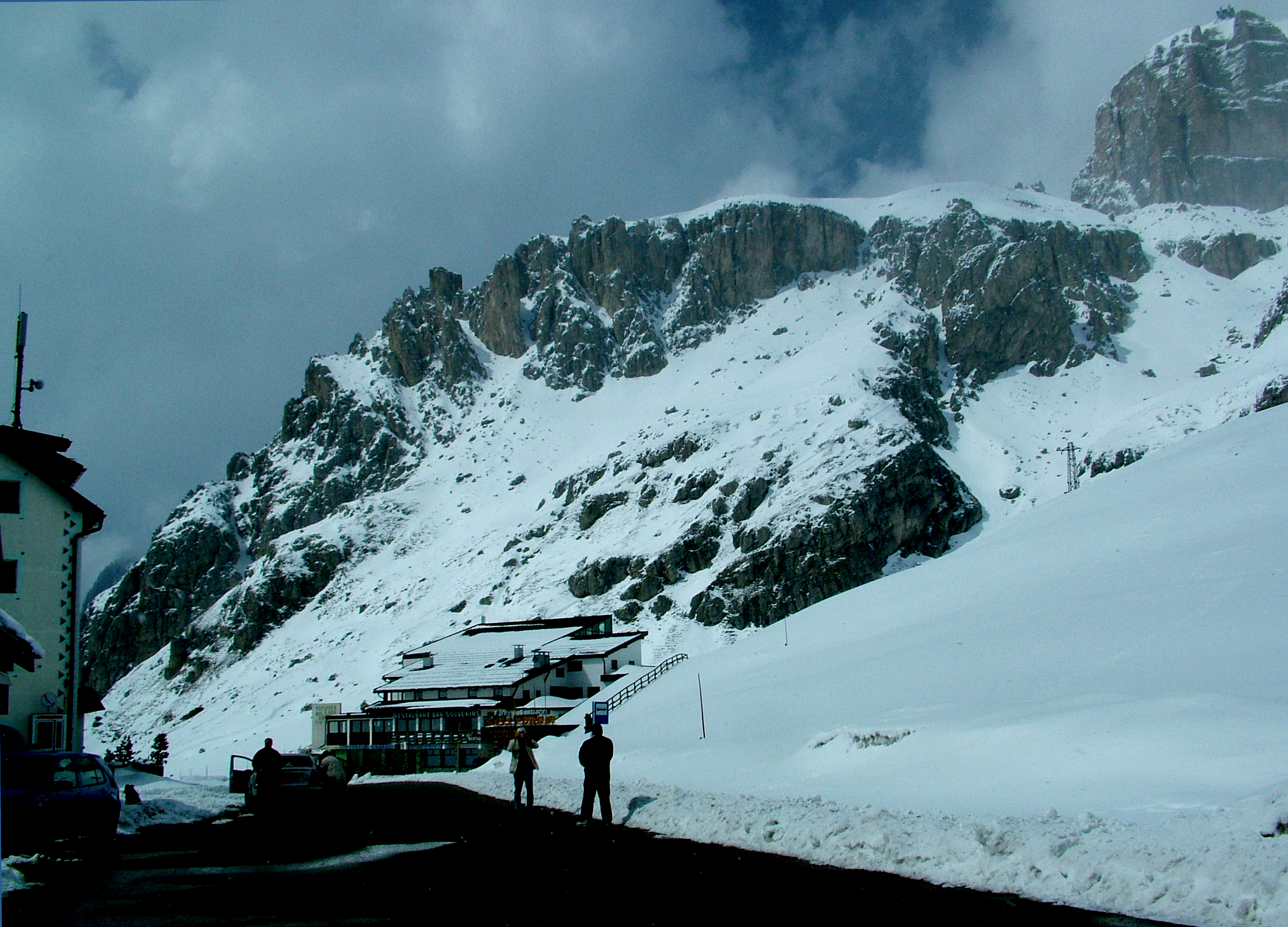 Pordoi-hágó, olasz Alpok